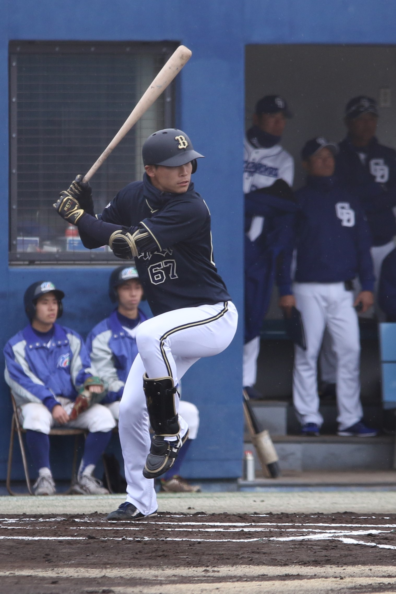 2019年3月17日、ナゴヤ球場にて